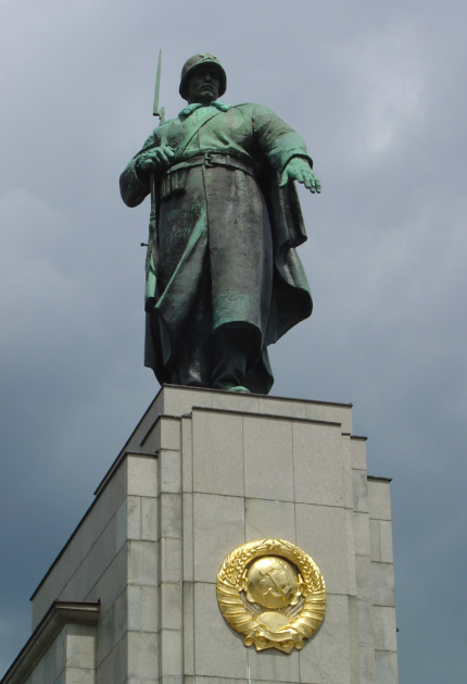 Sowjetisches Ehrenmal (Berlin-Tiergarten)